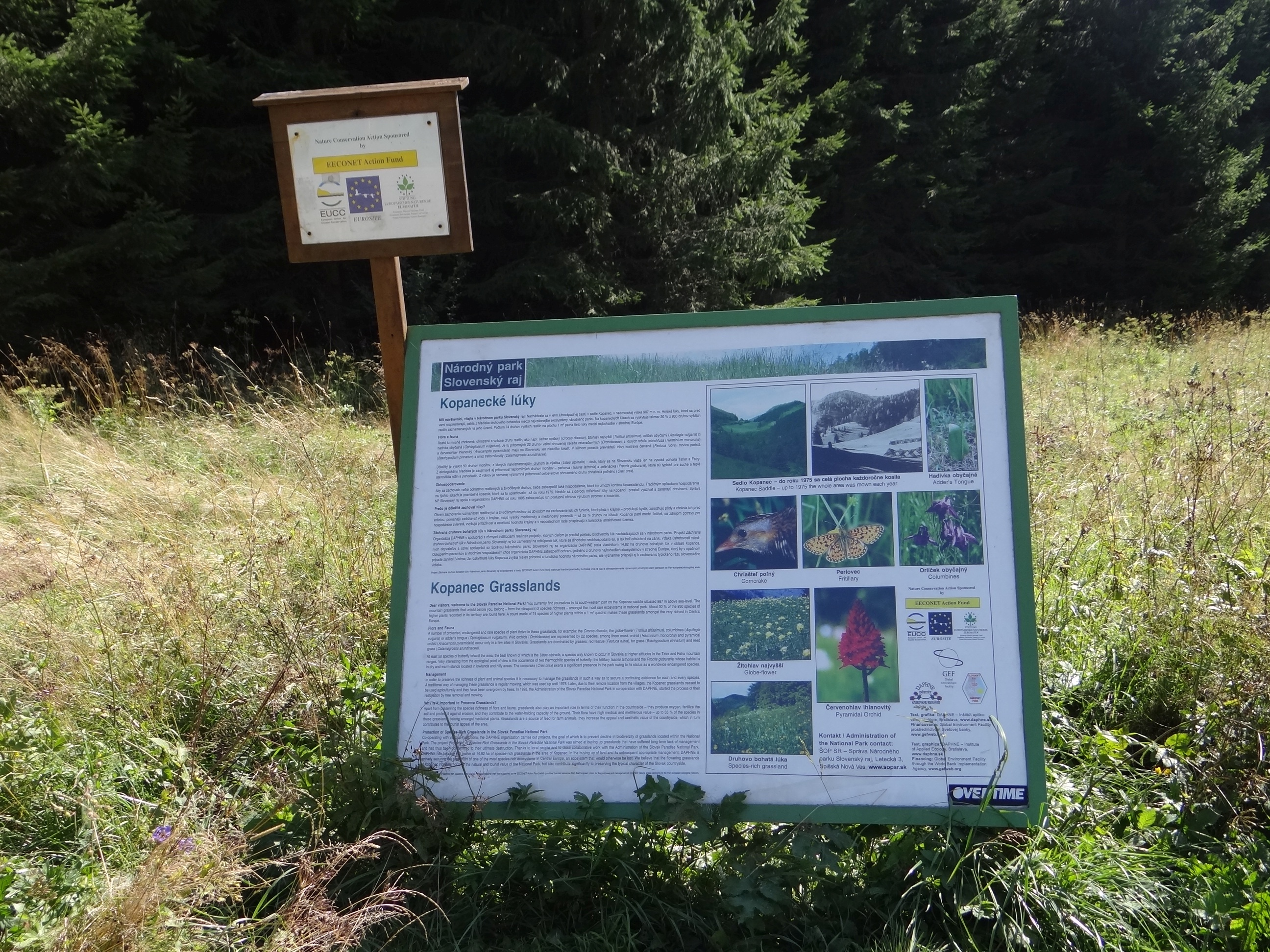 Sedlo Kopanec